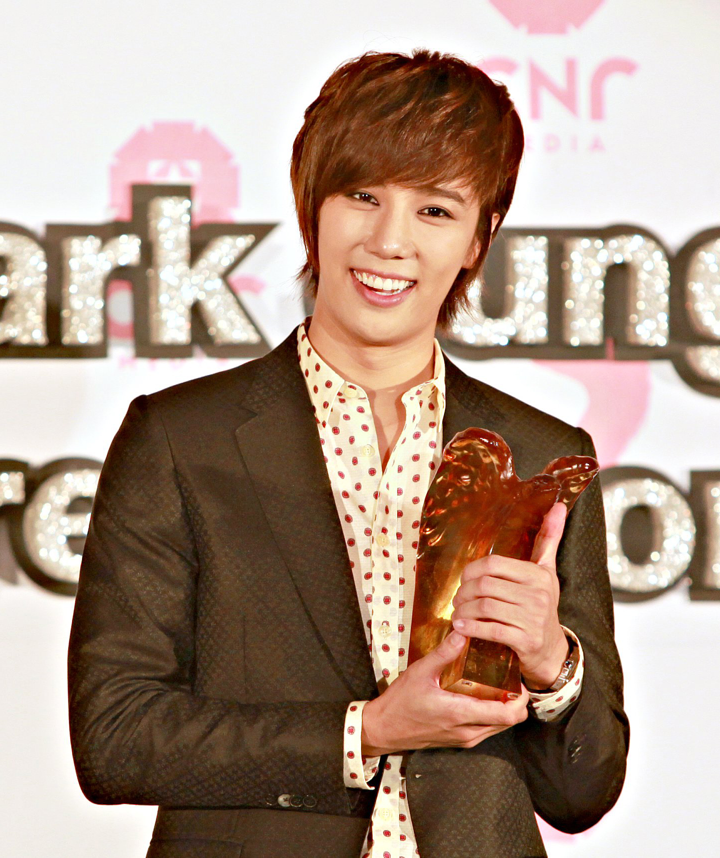 韓星朴政珉今日2010/09/30在台灣正式與索尼音樂簽約NEWS B